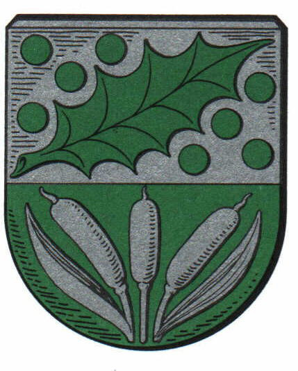 Wappen von Nortmoor